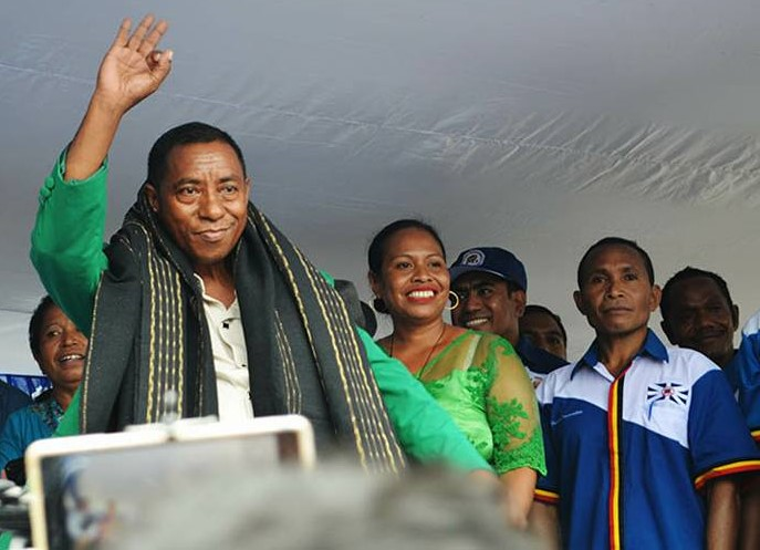 António da Conceição, Bildungsminister Osttimors, beim Wahlkampfauftritt in Gleno